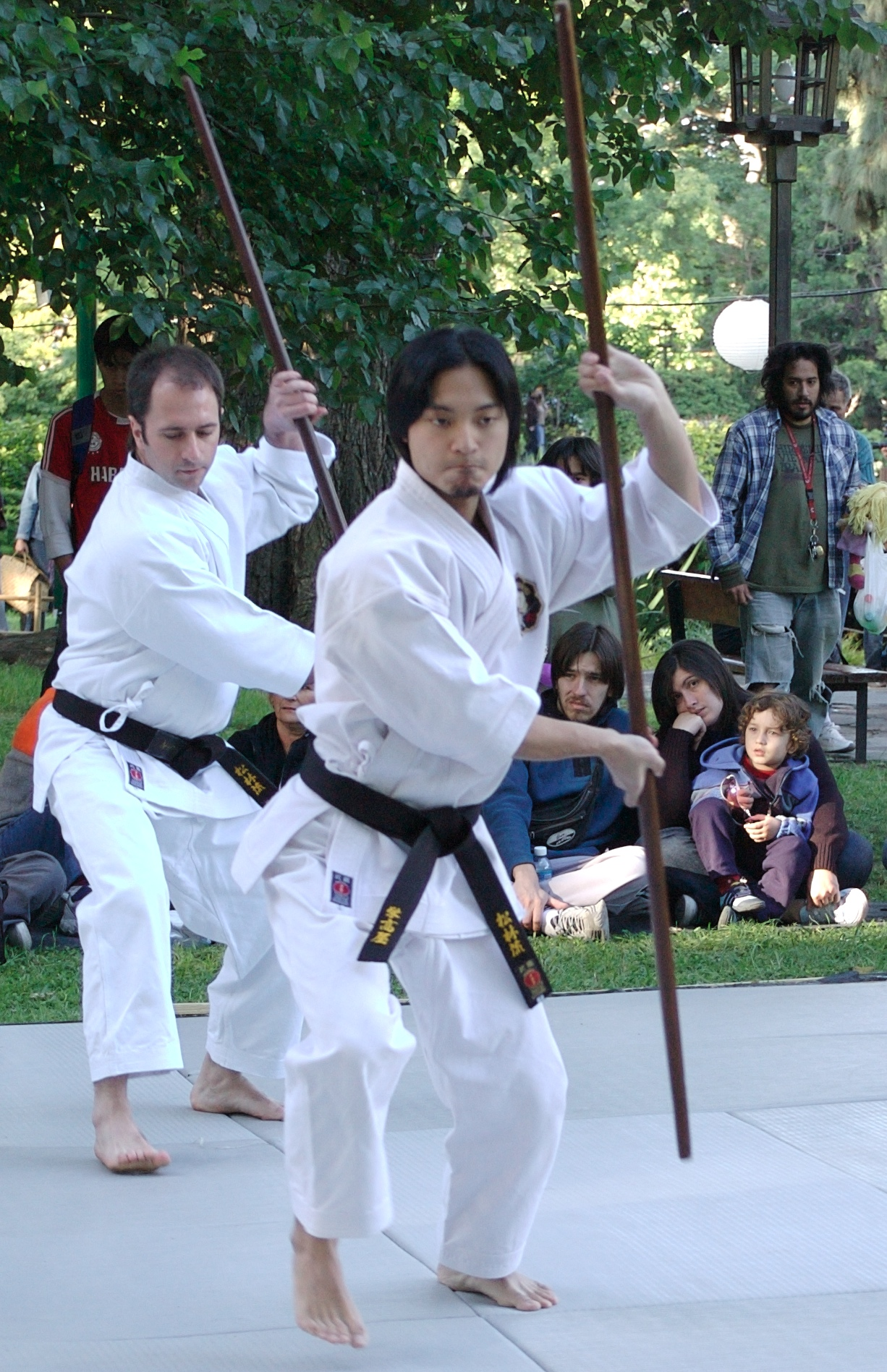 Démonstration de bojutsu